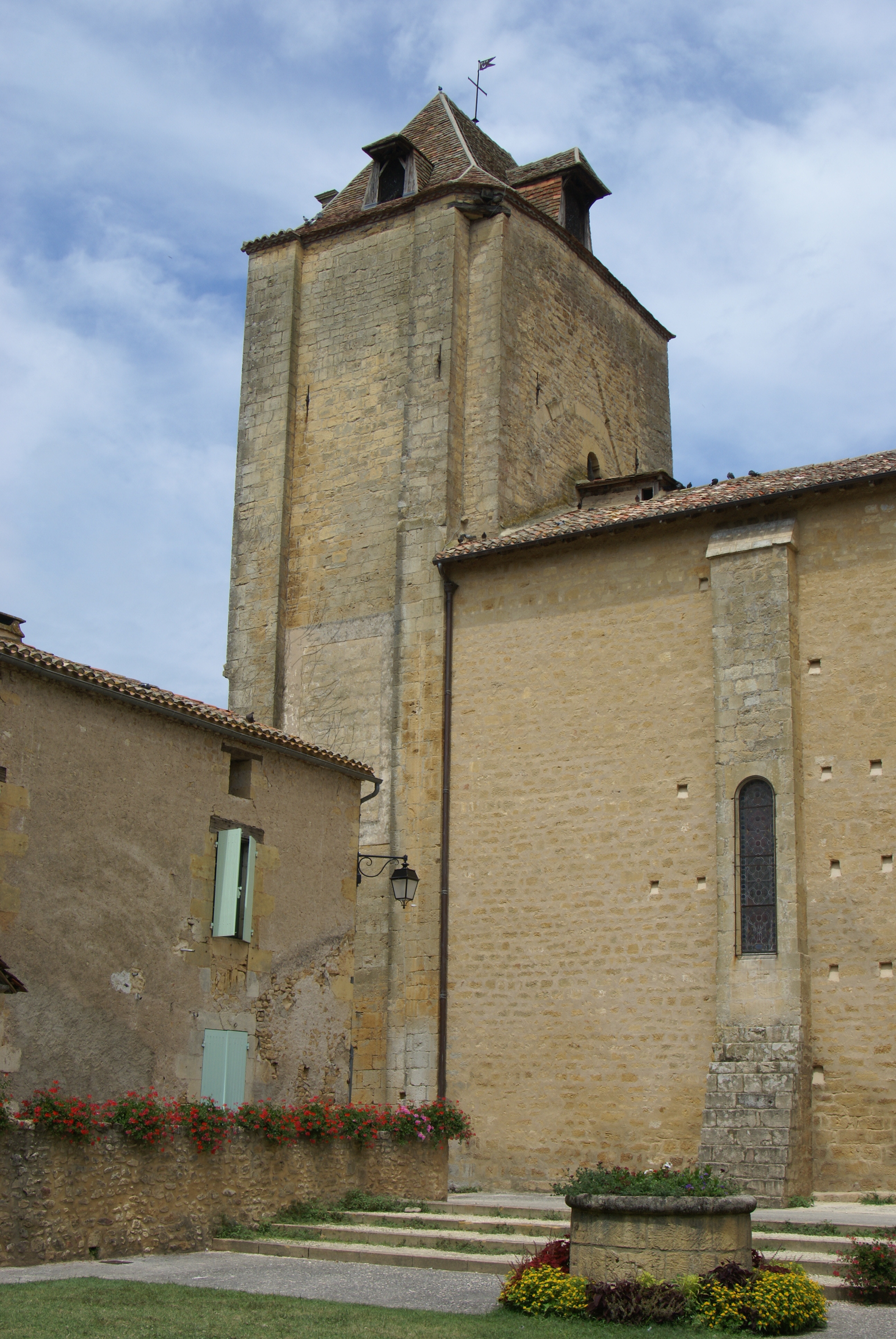 church of Trémolat, Dordogne, France This edifice is classé Monument Historique.